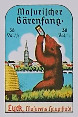 Flaschenaufkleber "Bärenfang"